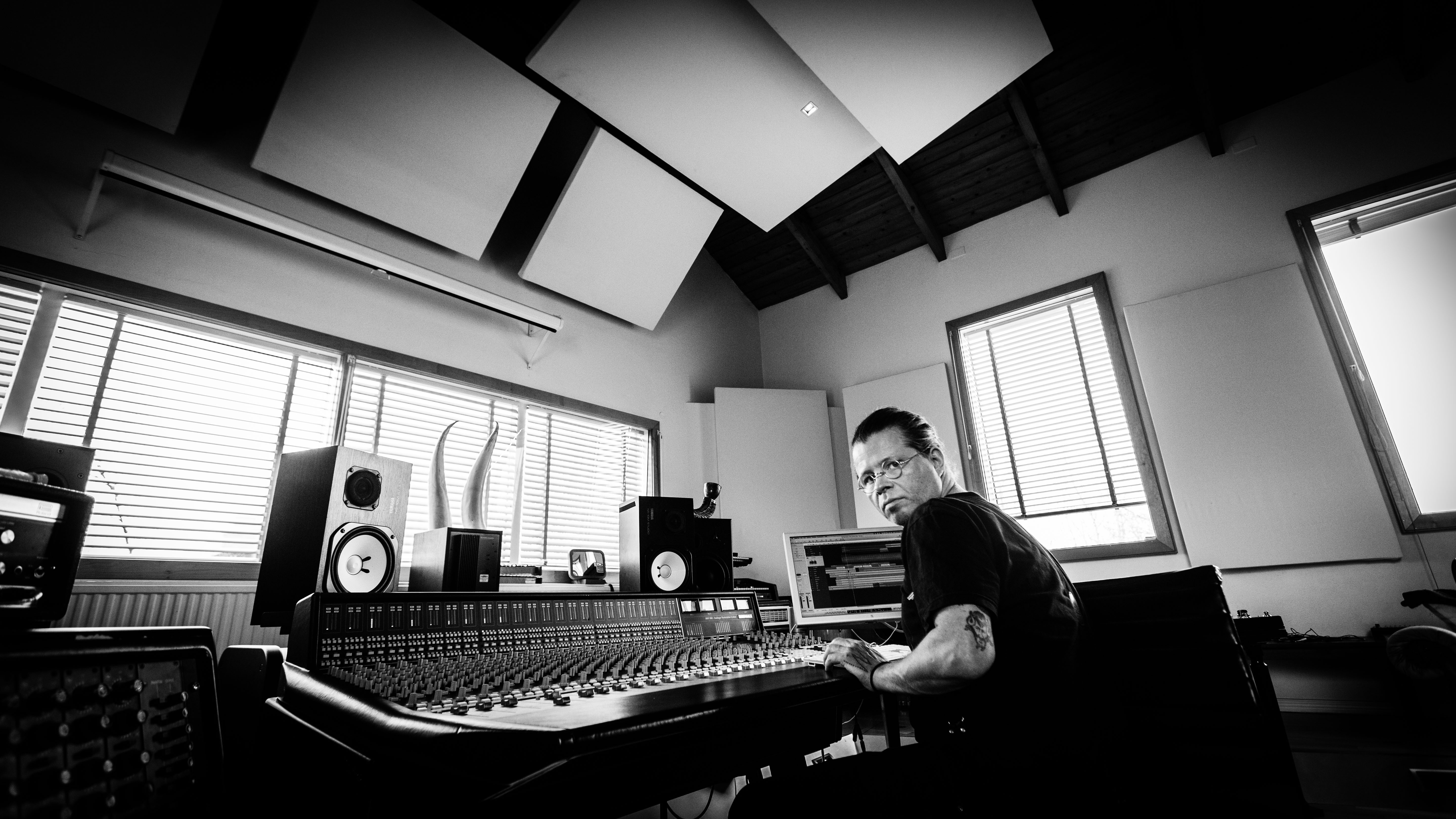 Flickr Tags: iceland reykjavik studio greenhouse kaukolampi kxp.